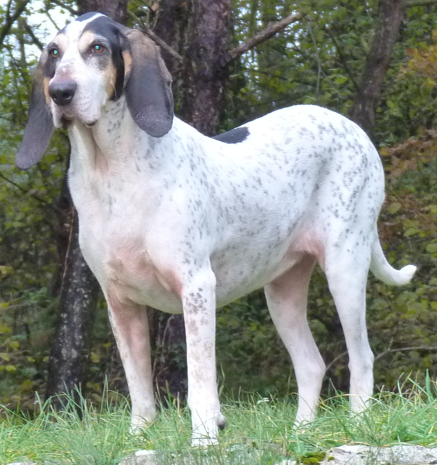 Petit Gascon Saintongeois Femelle de cinq ans